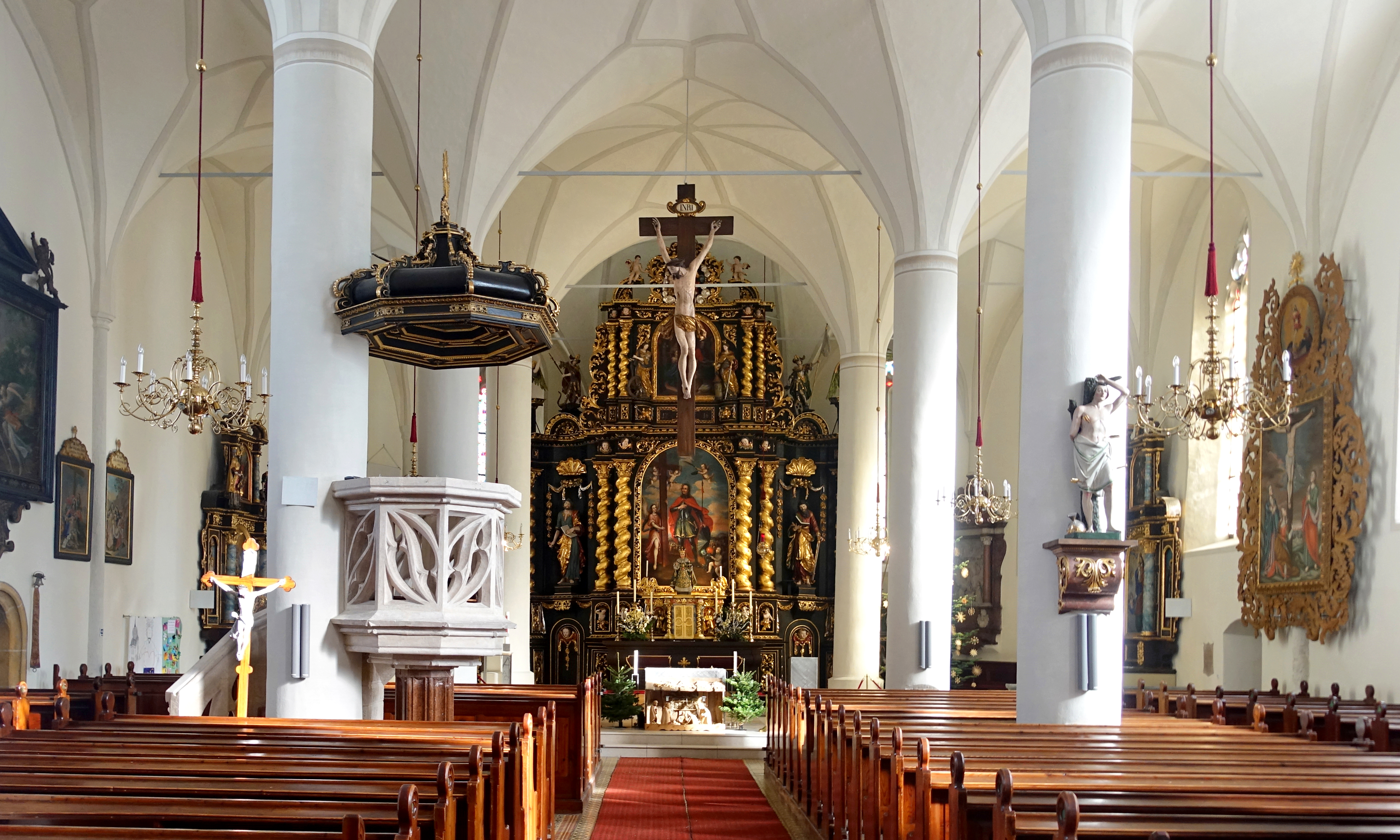 Prachtvoll ausgestattet.